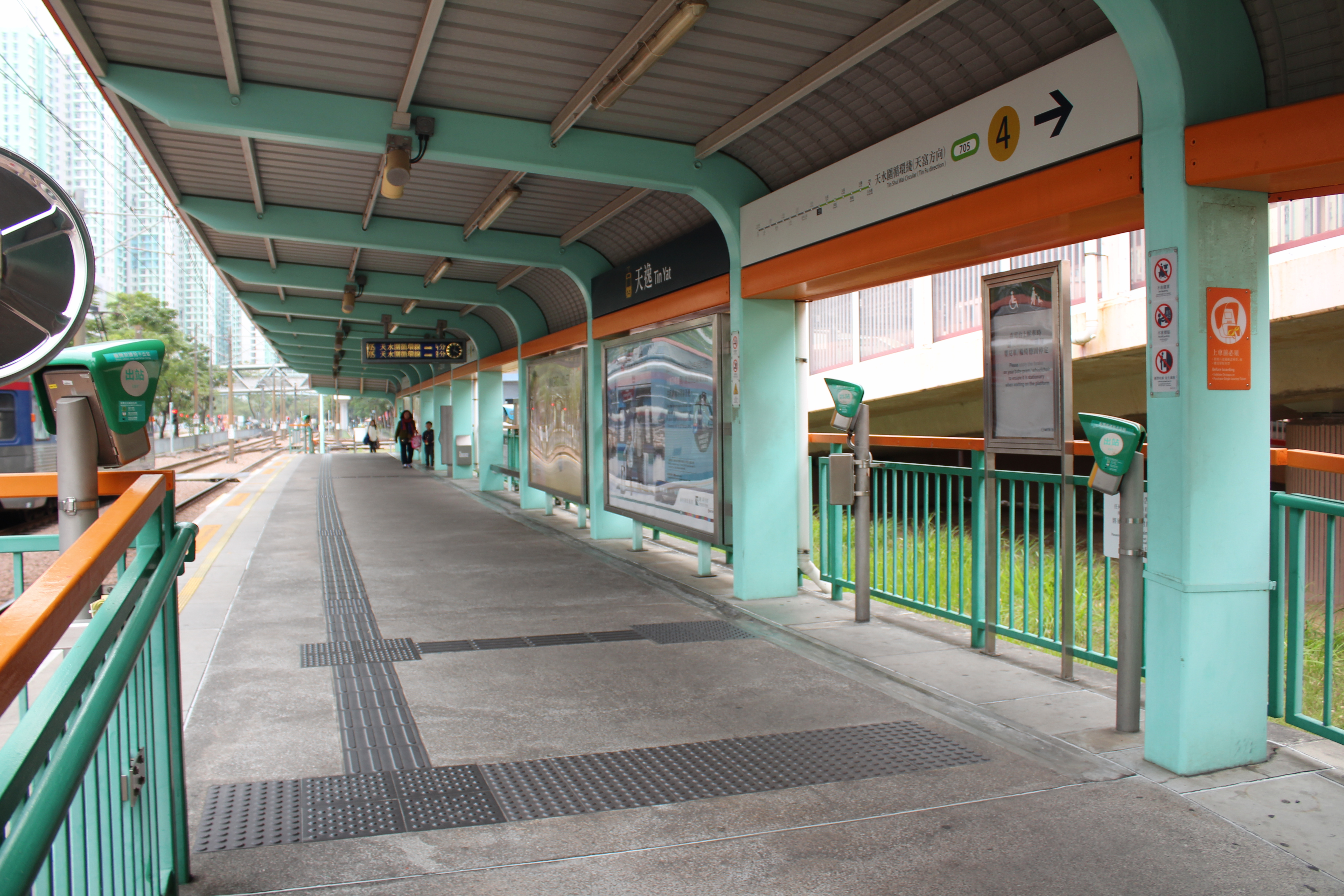 天逸站4號月台